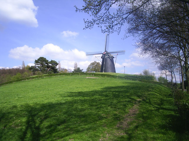 Windmolen Op de Vrouweheide, foto eigen werk Categorie:Afbeelding molen